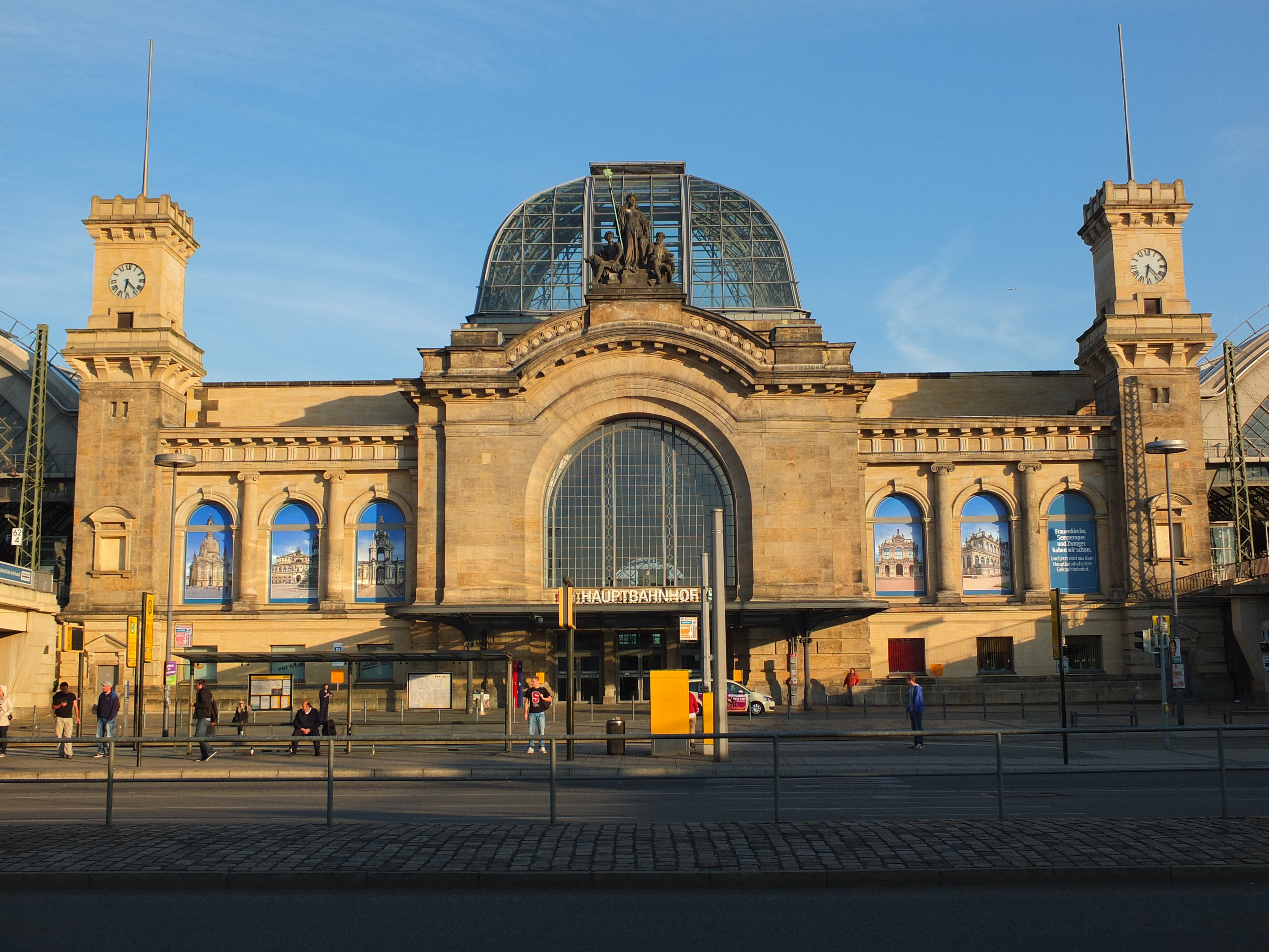 Dresden Hauptbahnhof